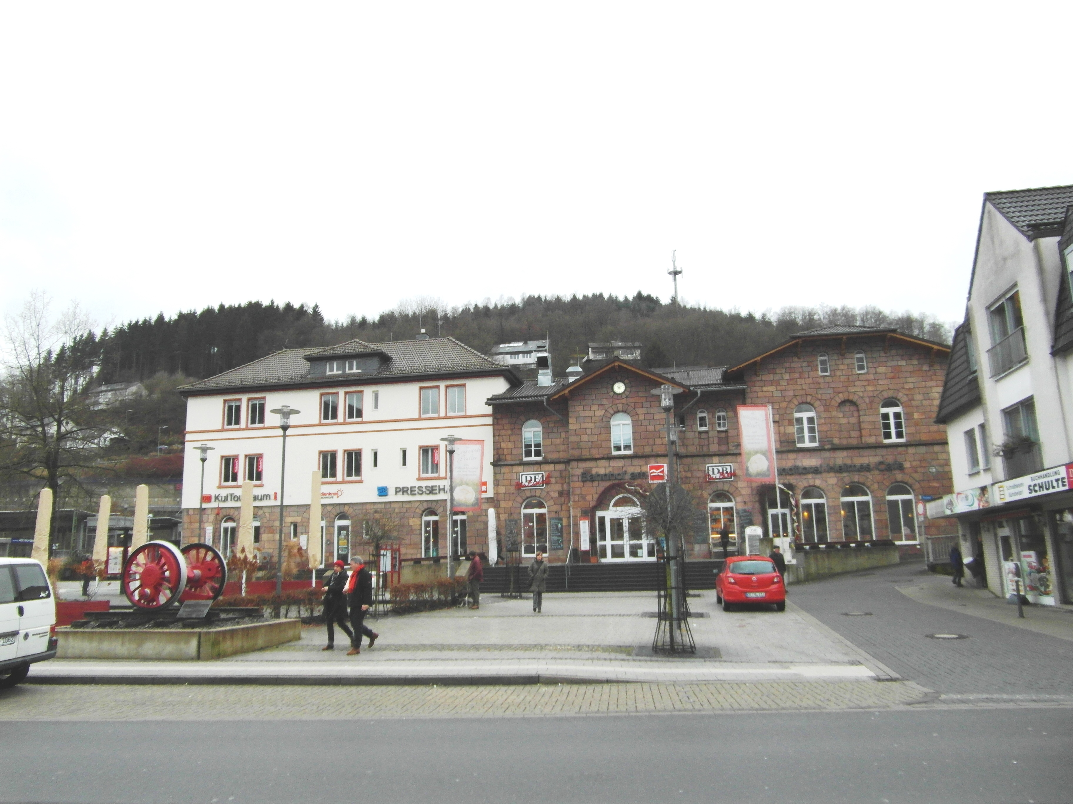 Renovierter Bahnhof in Altenhundem, 2012 als "Wanderbahnhof" ausgezeichnet und 2013 als "kundenfreundlicher Bahnhof"